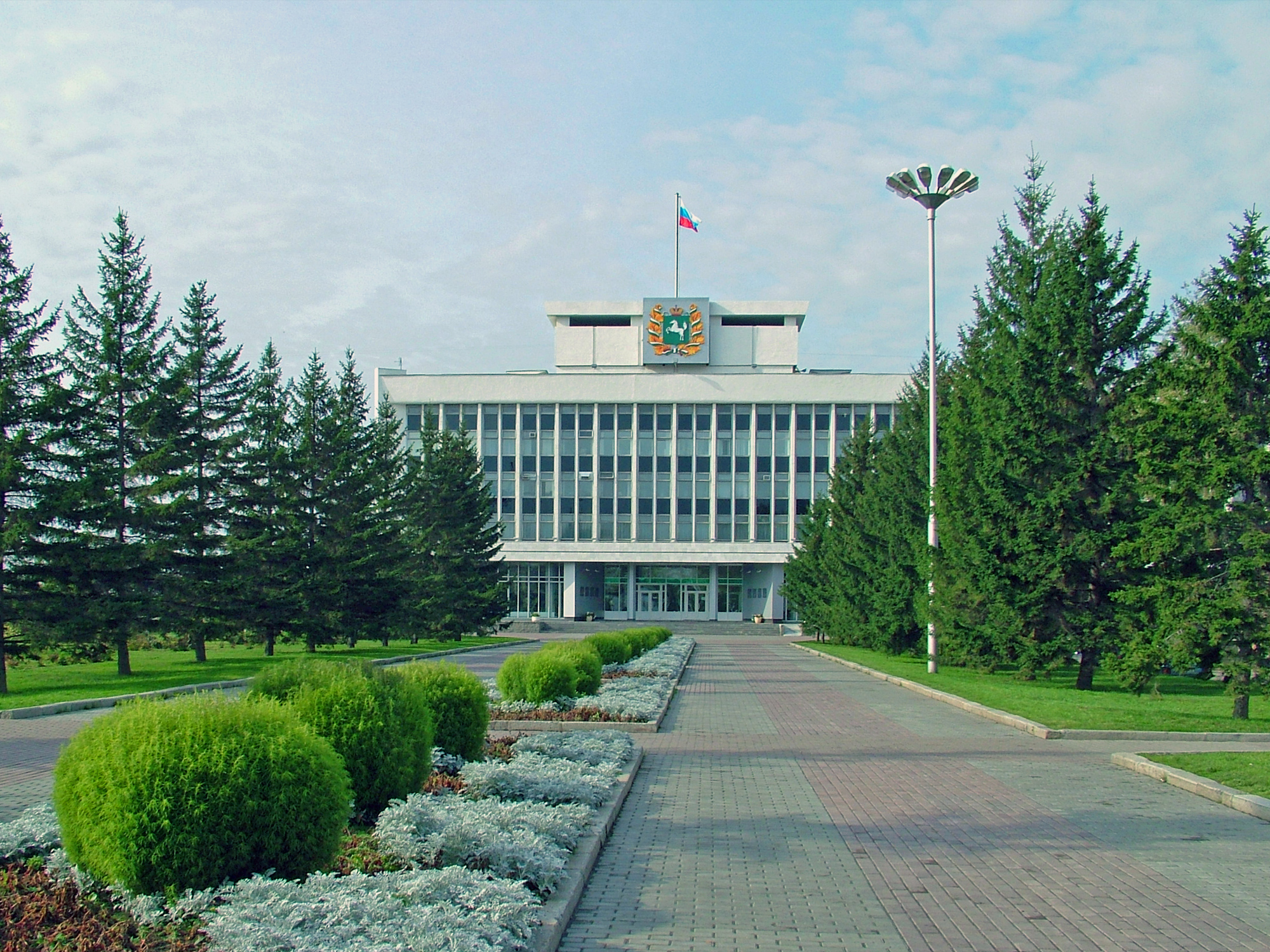 Администрация Томской области